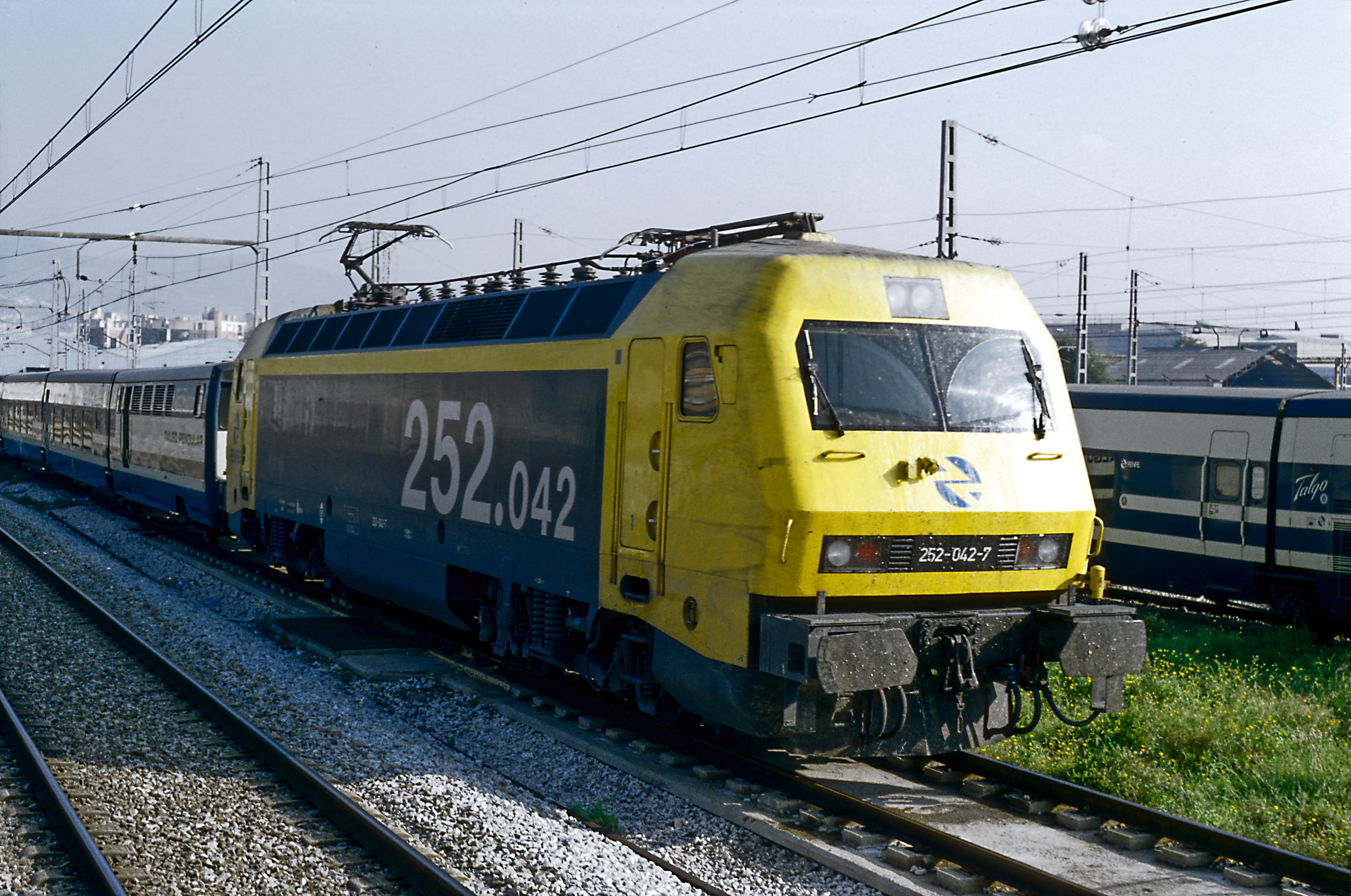 Reisezug-Abstellgruppe vor Barcelona, 252 in der klassischen Breitspurlackierung schwarz-gelb (amarillo-gris, »taxi«).